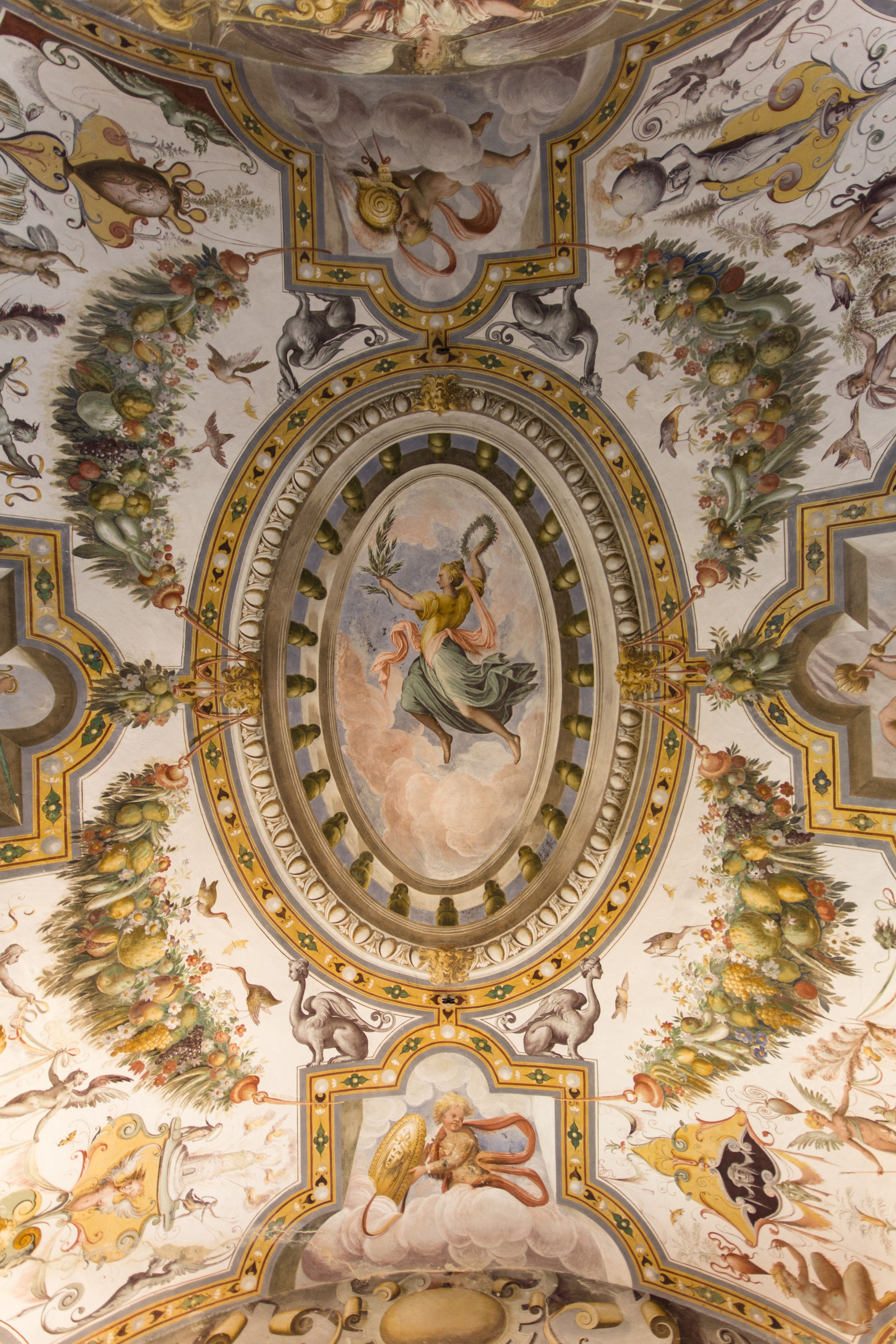 Castello di Torrechiara - MIBAC - Soffitto This is a photo of a monument which is part of cultural heritage of Italy.